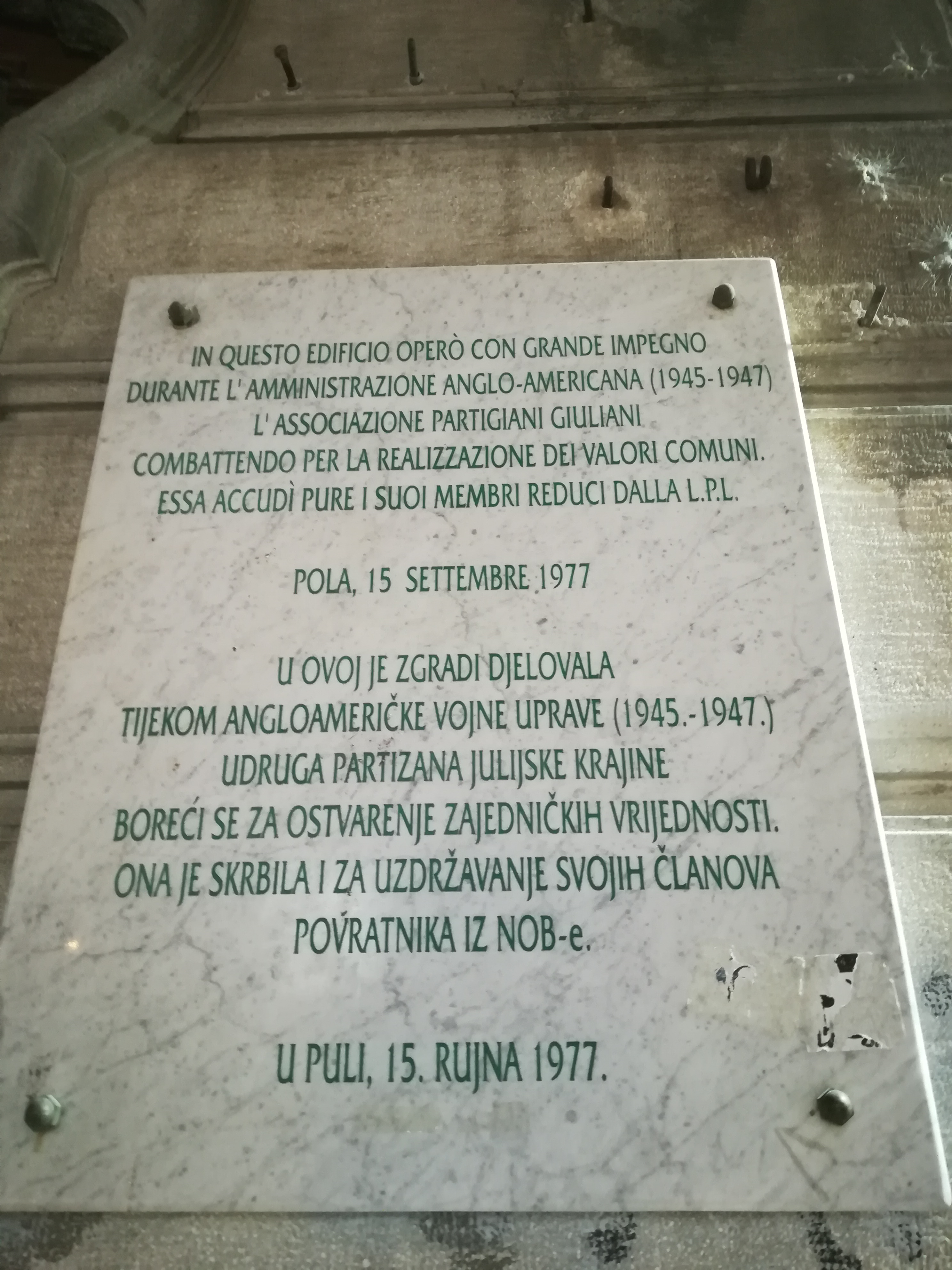 Memoriale in ricordo dell'Associazione Partigiani Giuliani a Pola.